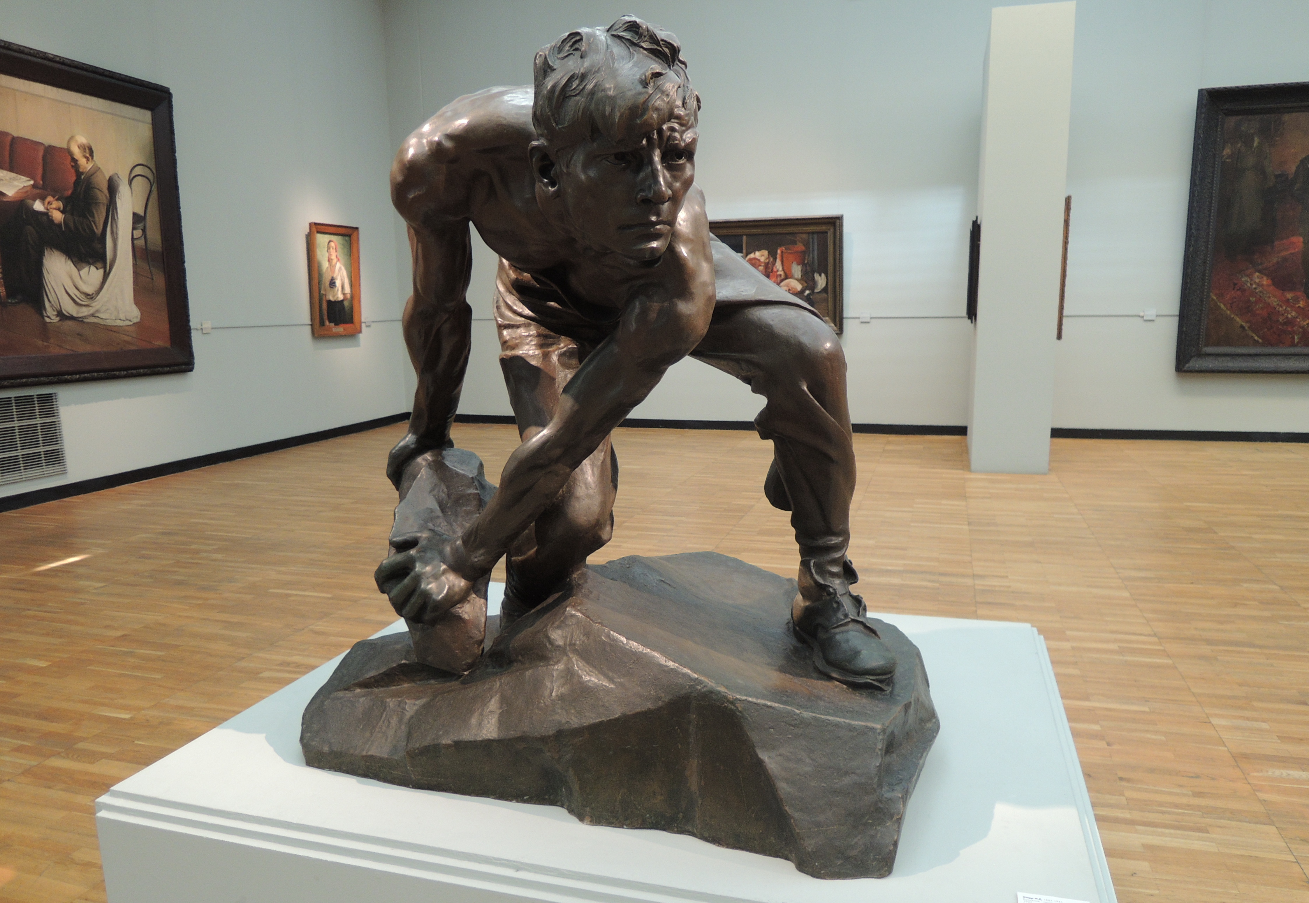 Шадр И.Д. (1887-1941). "Булыжник — оружие пролетариата". 1927. Бронза. ГТГ. Инв. 27957